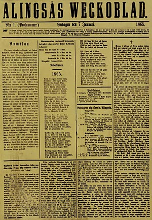 Första numret av Alingsås Tidning, från tidningens hemsida